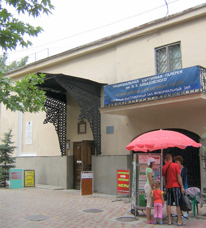 Вхід до картинної галереї Айвазовського у Феодосії